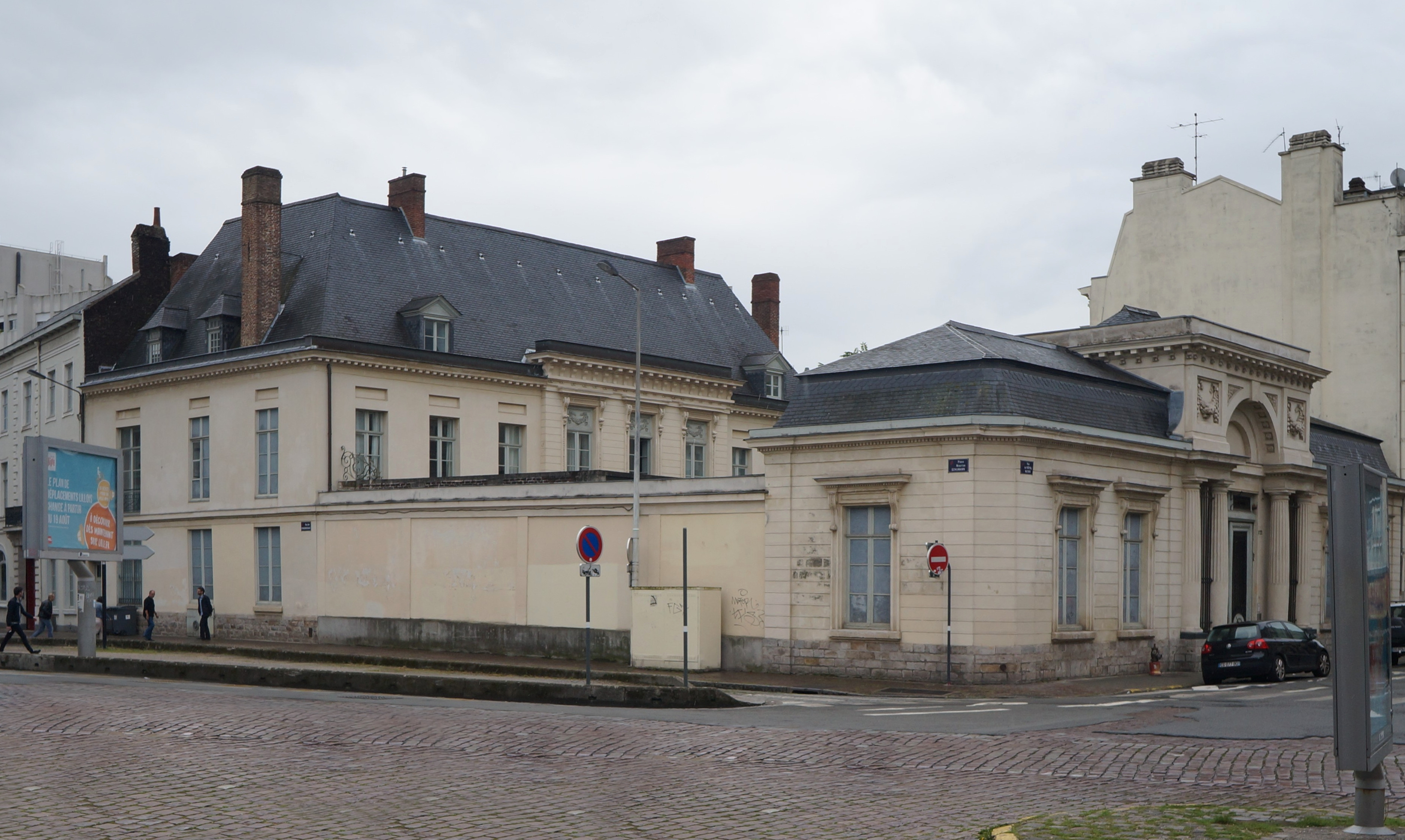 Hôtel Petipas de Walle 122 rue de l'Hopital-Militaire à Lille Nord (département français)